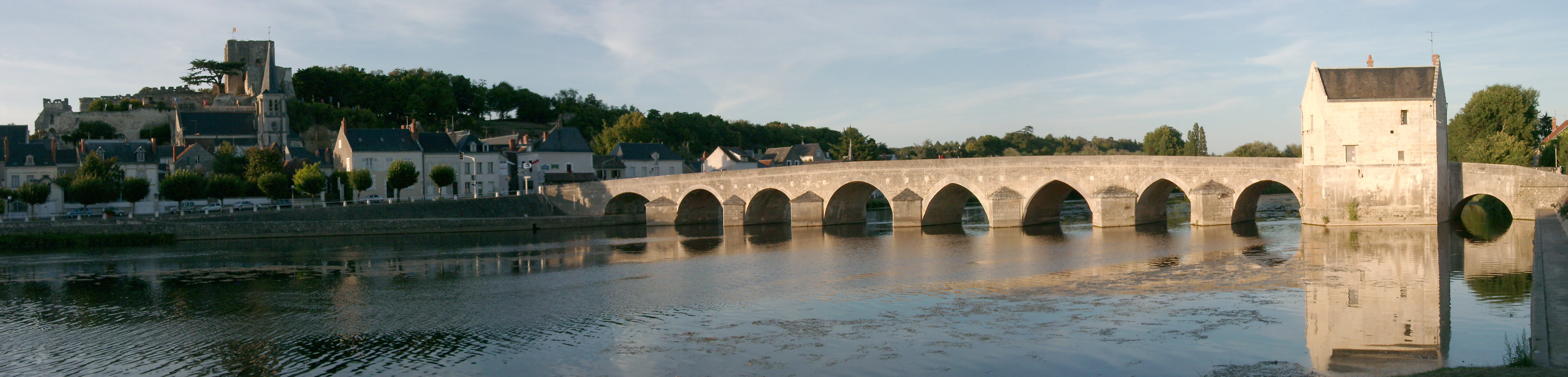 Le Cher à Montrichard, le pont avec sa maison du passeur (XVIe-XVIIe siècle), l'église Sainte-Croix et le donjon du château